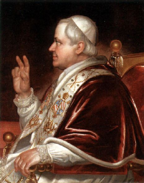 Pio IX, Papa